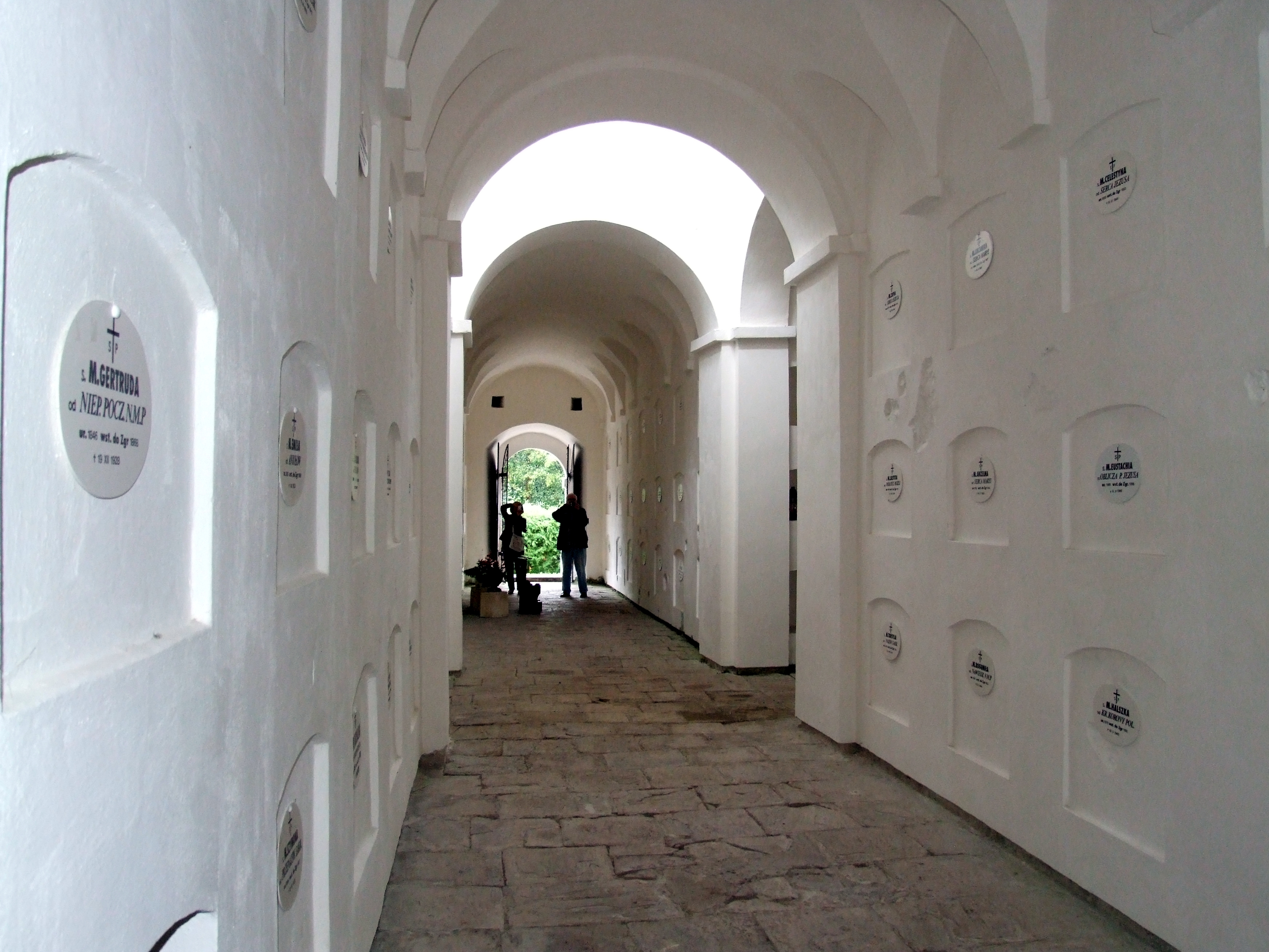 Wnętrze grobowca s.s. niepokalanek od strony ołtarza.